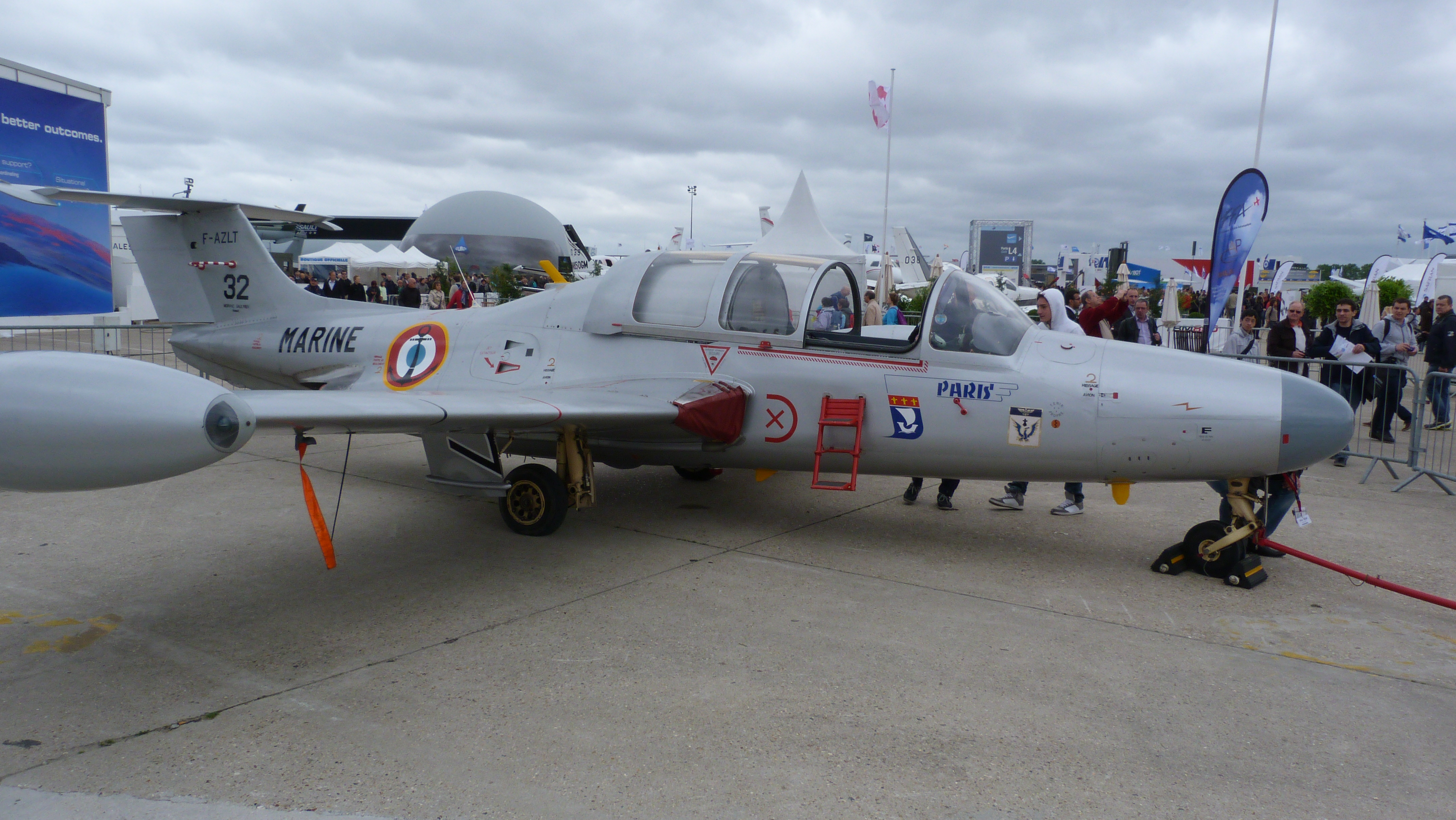 Paris Air Show 2013